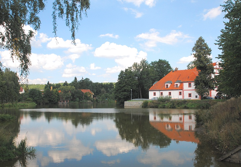 Lnáře